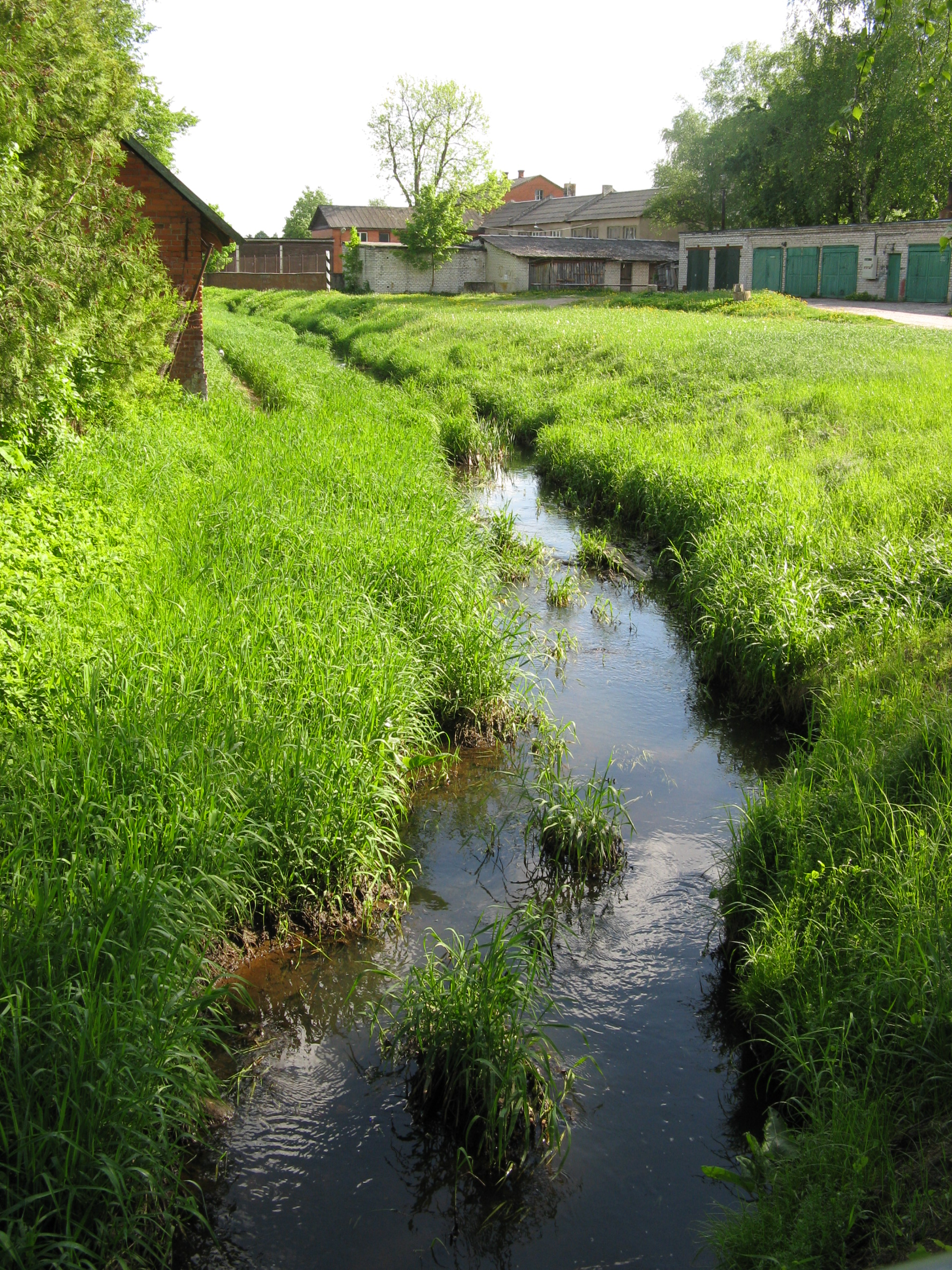 Valgas un Valkas robežupe